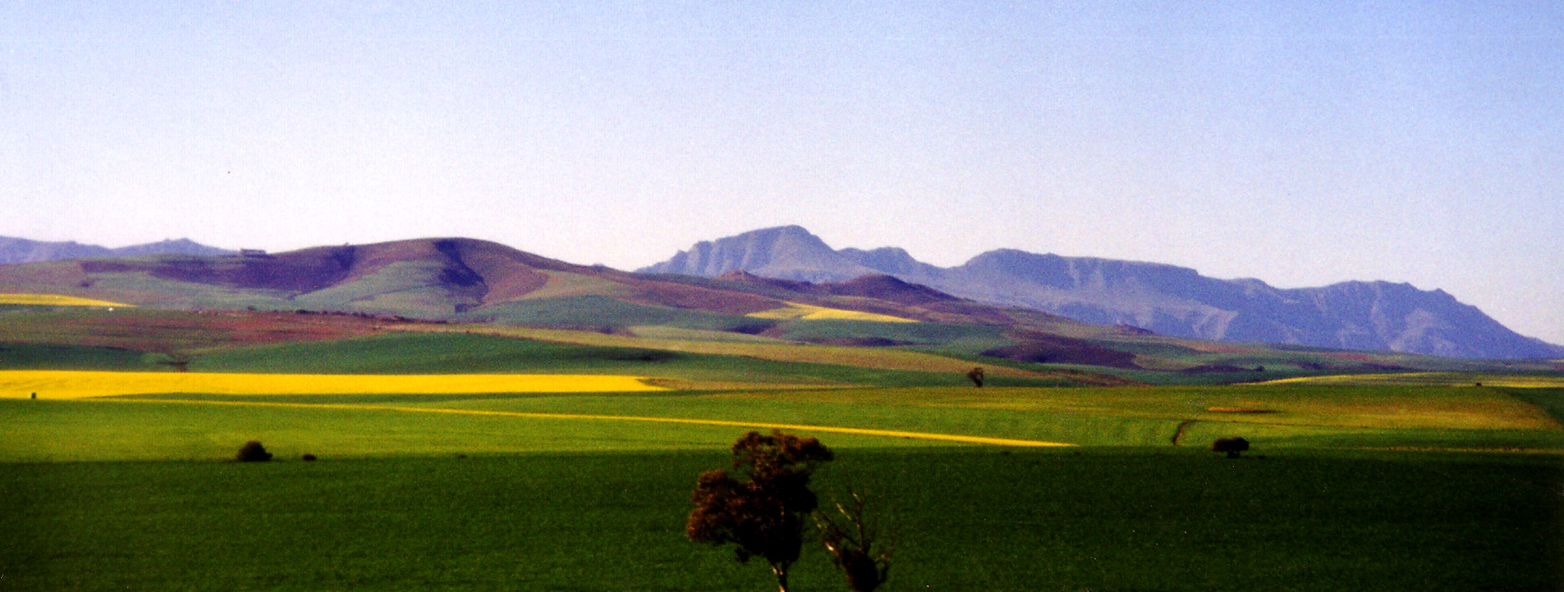 CapeOverberg spring, in September 2002 Taken by myself, Andres de Wet, in September 2002